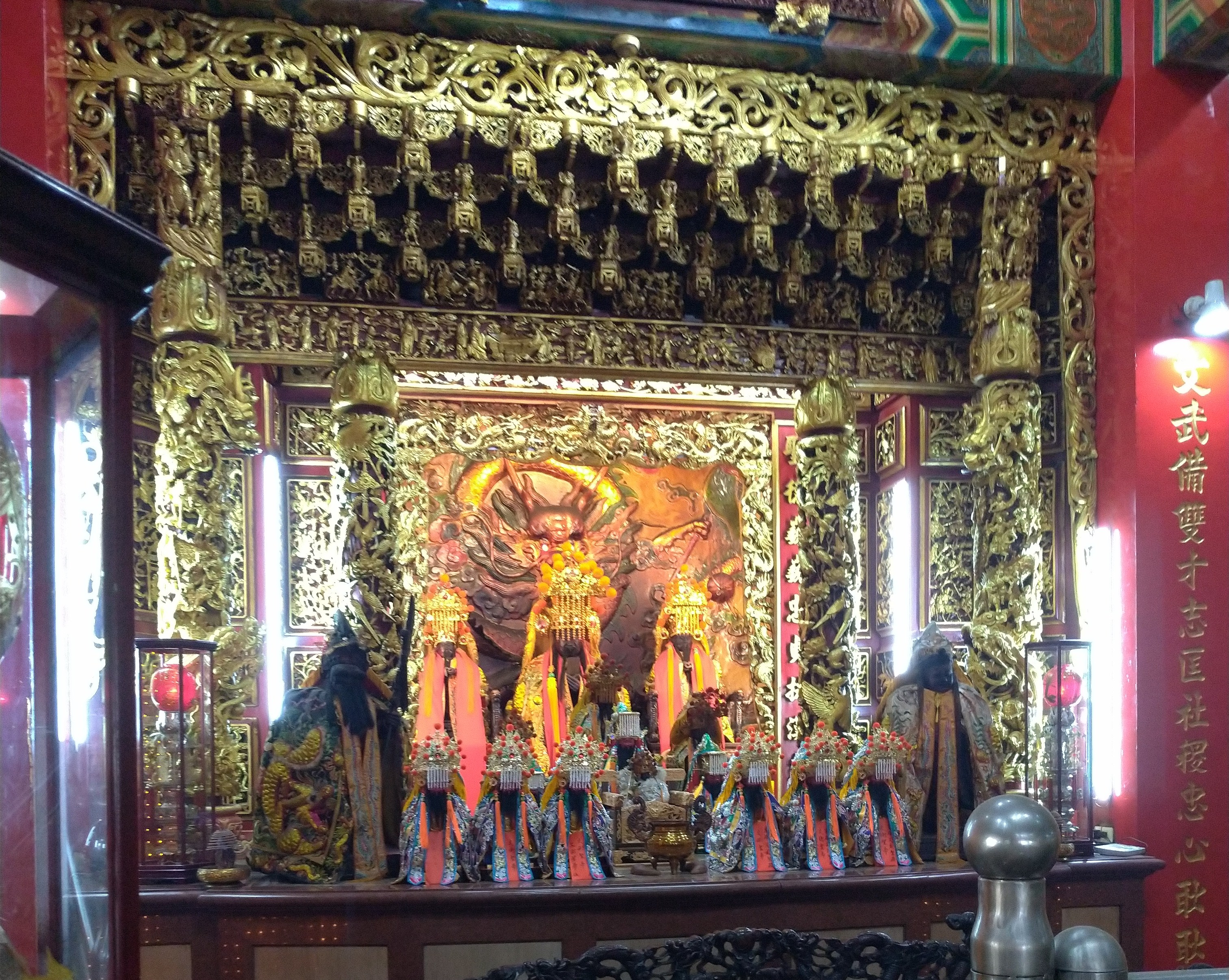 中文（台灣）: 文武聖殿文衡聖帝；使用本圖片請遵循(CC 姓名標示-非商業性-禁止改作)，Please follow (CC BY-NC-ND 3.0 TW)